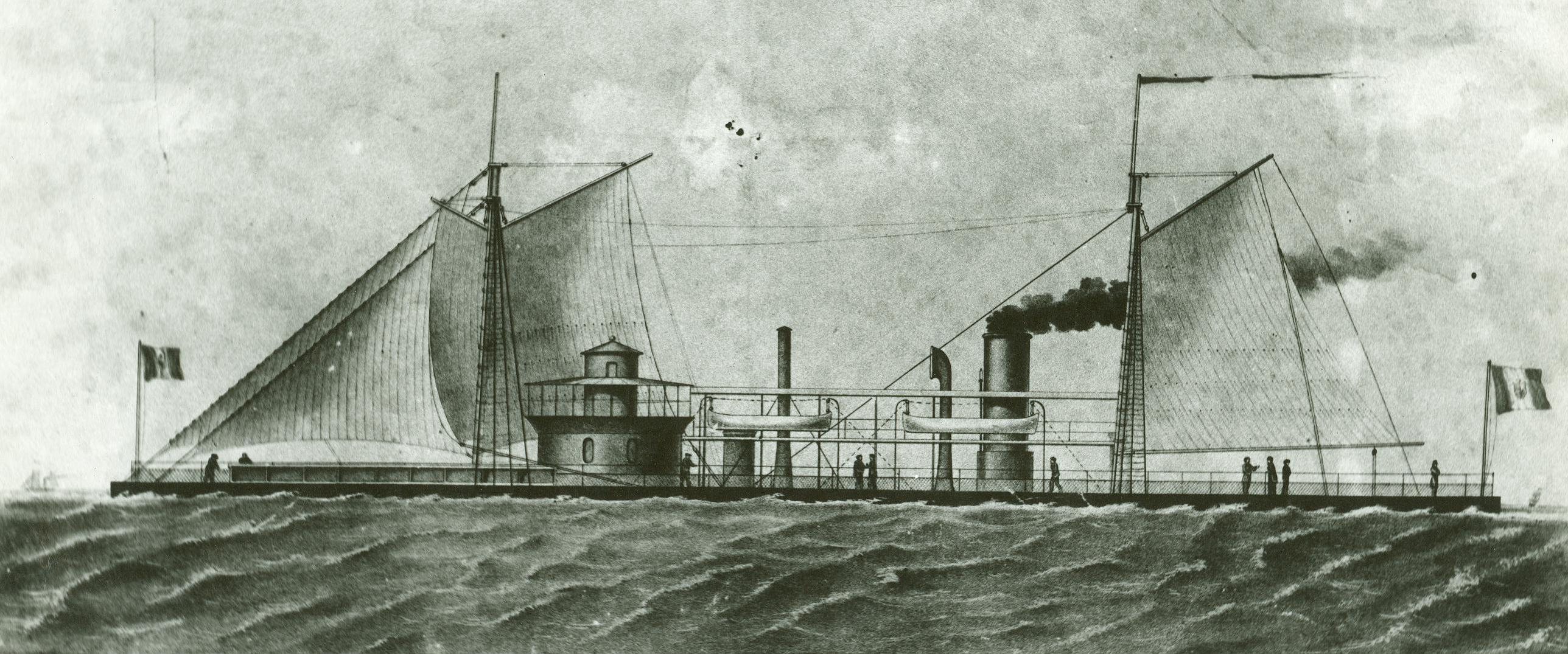 Litografía que muestra al monitor blindado de río Atahualpa, antiguo USS Catawba, partiendo de Nueva Orleans hacia el Perú, en Enero de 1869. El Atahualpa, con aparejo de goleta, navega, a vela, en el mar